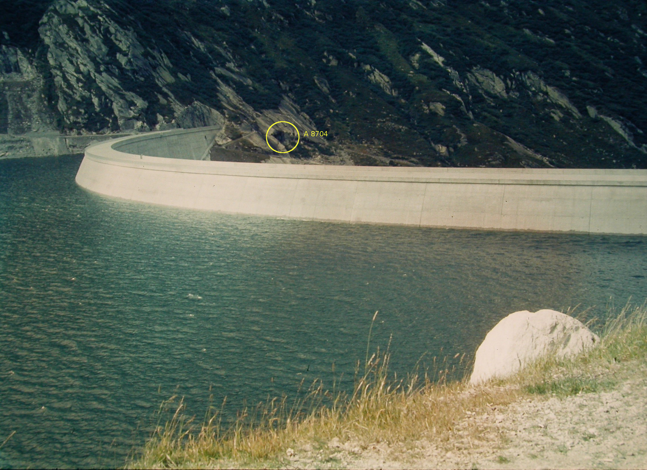 Staudamm Santa Maria, Graubünden, Schweiz, 1969: Bunker A8704